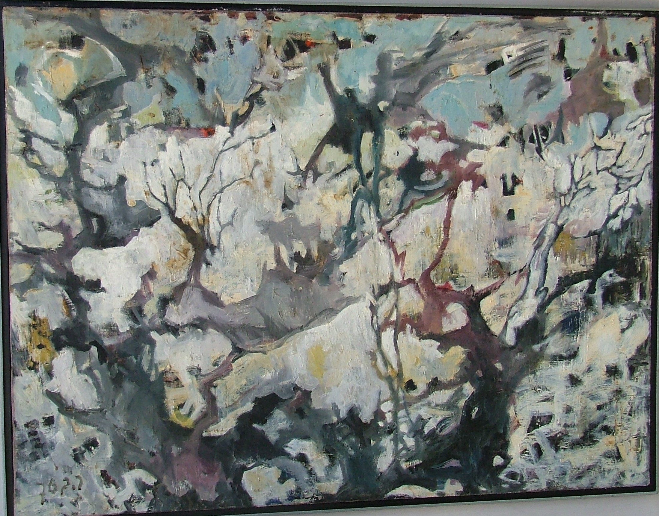 ציור שמן